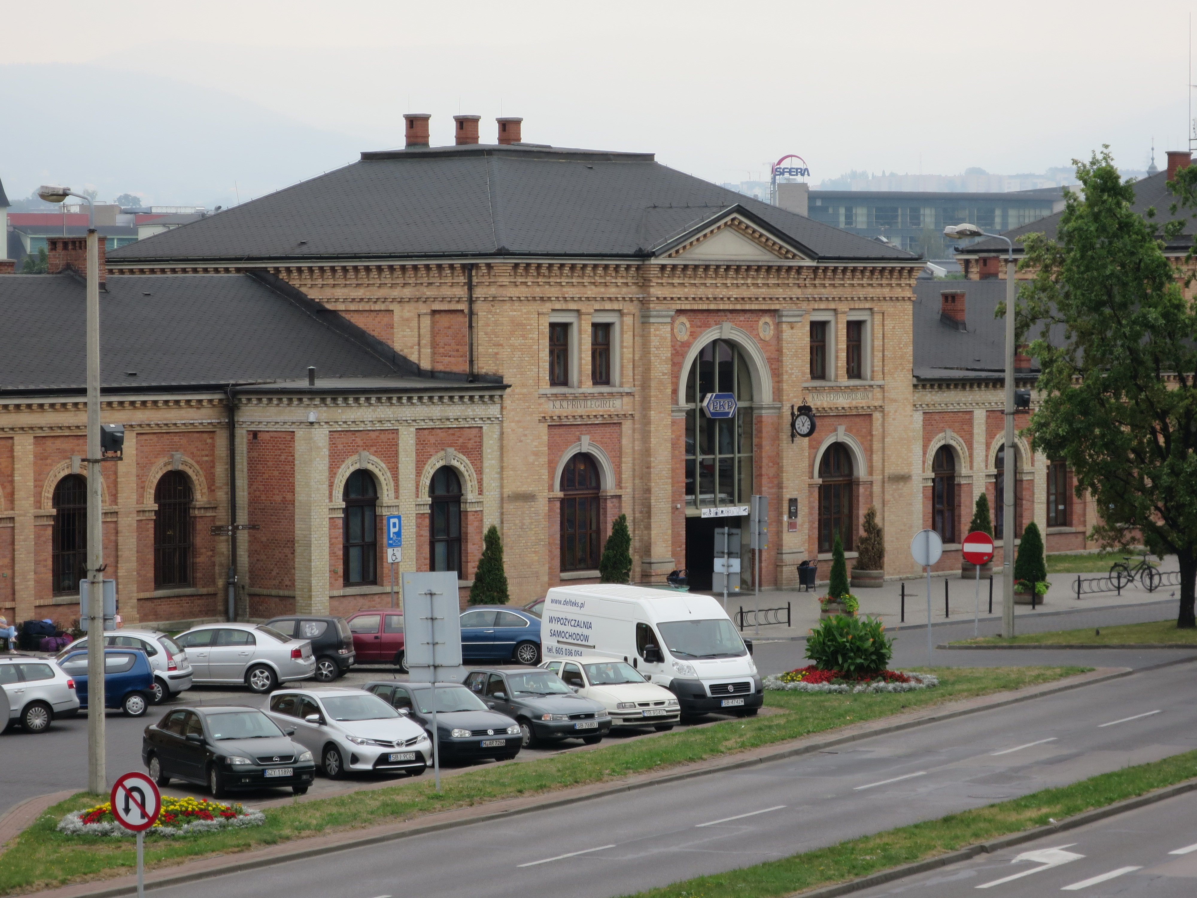 Bielsko Biała Główna This photo was taken during Railway Wikiexpedition 2015 set up by Wikimedia Polska Association in cooperation with Fundacja Grupy PKP. You can see all photographs in category Wikiekspedycja kolejowa 2015.